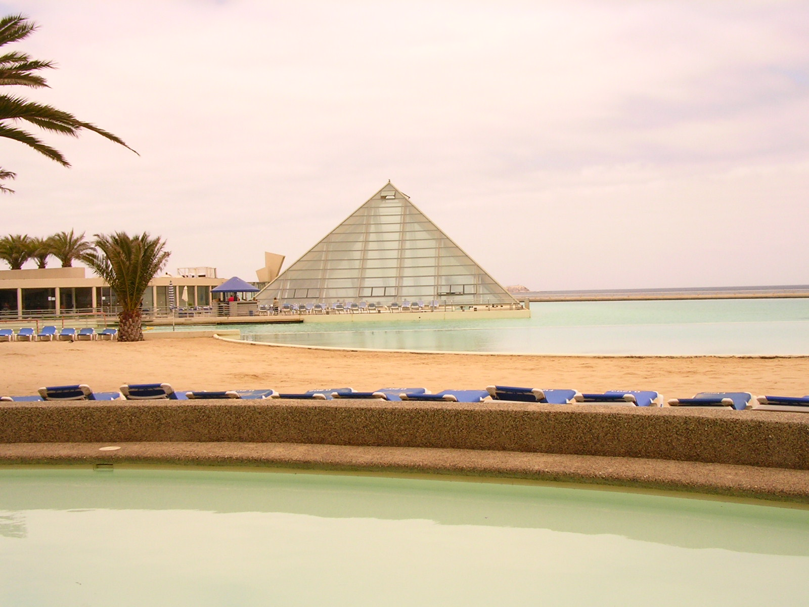 Blick auf das Hallenbad mit Pyramidendach des San Alfonso del Mar